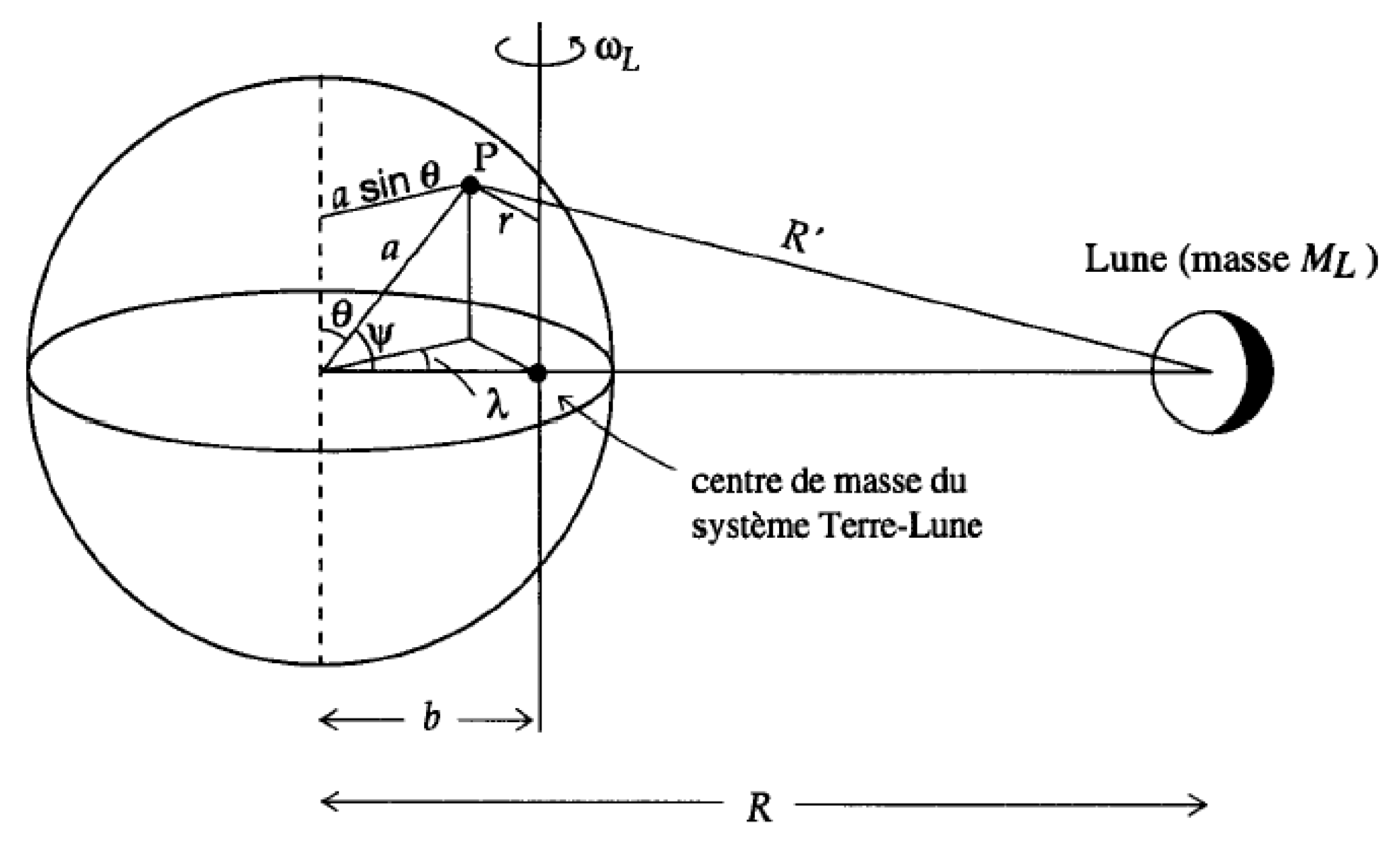 Description : Géométrie pour le calcul du potentiel de marée.